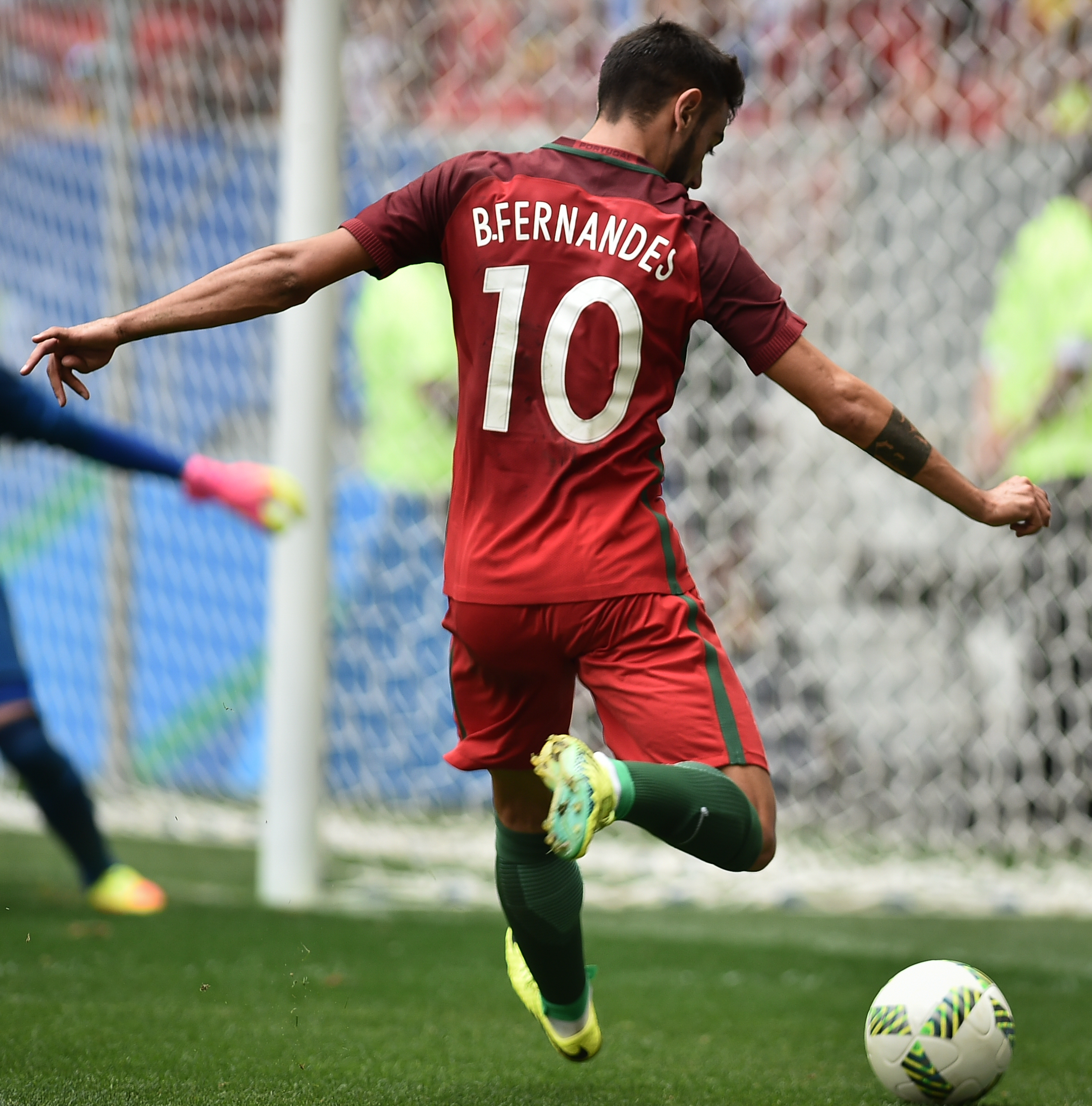 Estádio Nacional de Brasília Mané Garrincha, Brasília, DF, Brasil, 13/8/2016 Foto: Andre Borges/Agência Brasília Portigal e Alemanha jogam neste sábado (12), no Estádio Mané Garrincha, pelas quartas de final do futebol masculino nas Olimpíadas 2016.